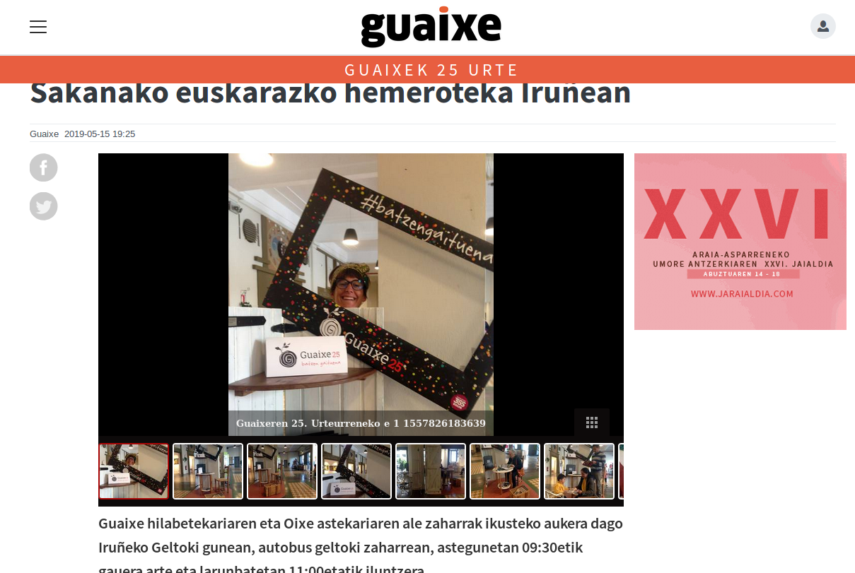 Guaixe aldizkariaren hemeroteka Iruñean. Albistea Guaixeren webgunean.